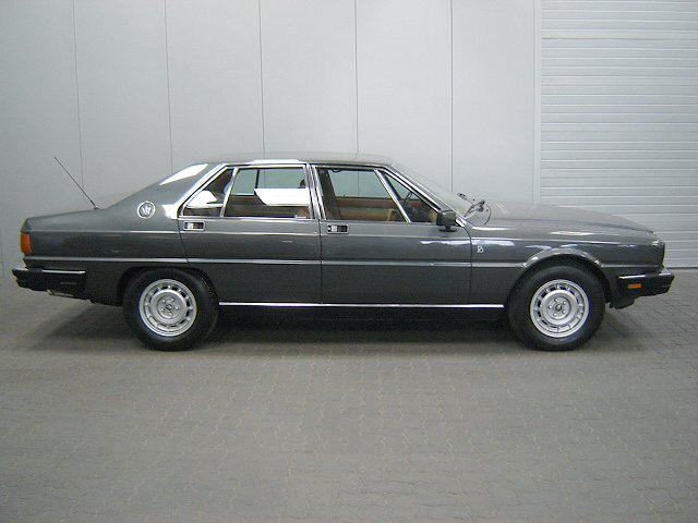 Maserati Quattroporte III, pictured in Munich